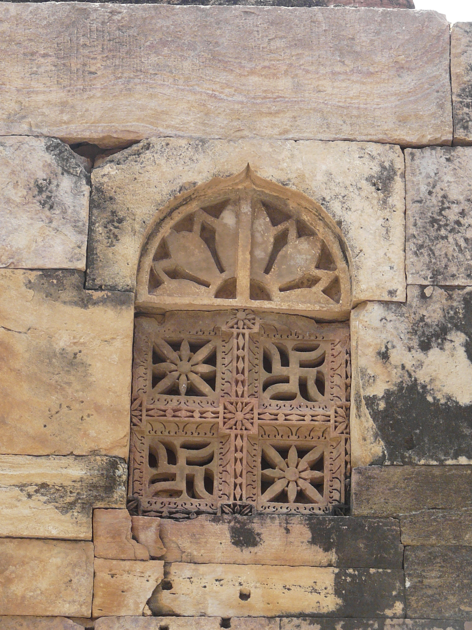 Window detail Adhai Din-ka-Jhonpra, Ajmer, Rajasthan, India